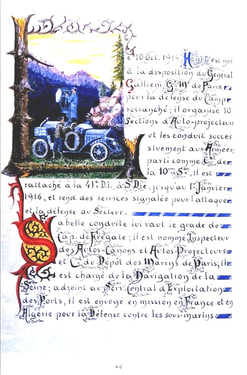 Photographie de la page 41 par le Chevalier Henri Goybet du livre de famille du général Mariano Goybet son arrière Grand père.rédigé de 1898 à 1931 retraçant l'histoire de sa famille. Oeuvre de plus de 200 pages numérotées sur parchemin avec très belles enluminures consultable aux archives de Savoie cote Ij 288. Cette image retrace la carrière du frère de Mariano , le capitaine de vaisseau Henri Goybet